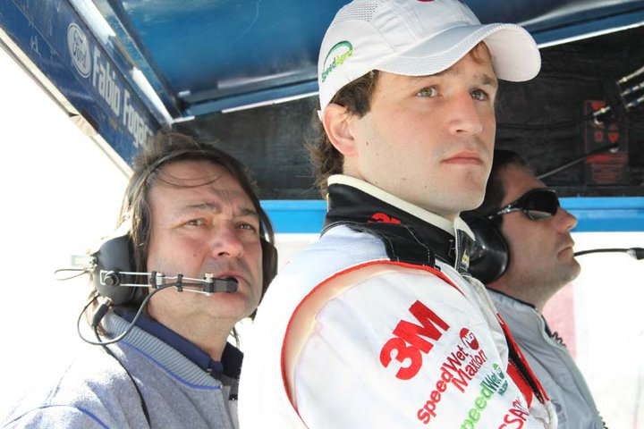 Alberto y Agustín Canapino, preparador y piloto de automovilismo de velocidad de Argentina